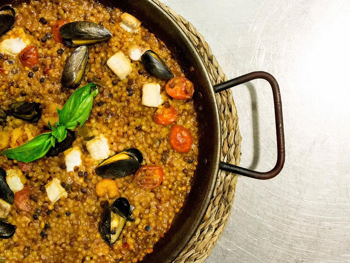 La fregula, frégula o fregola es un tipo de pasta dura de trigo con forma esférica de origen cerdeño.